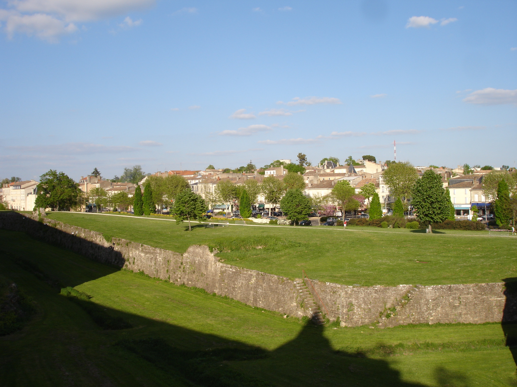 Citadelle de Blaye, Gironde (33), France